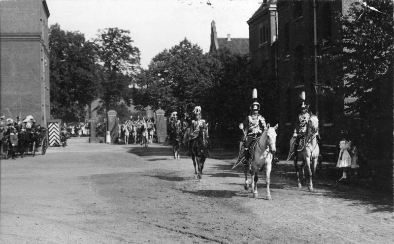 1911. Übergabe des 1. Leibhusaren-Regiments in Danzig an den Kronprinzen. Der Kaiser führt die Leibhusaren in die Kaserne zurück. Hinter ihm [August von] Mackensen. 16709-11 Information added by Wikimedia users.